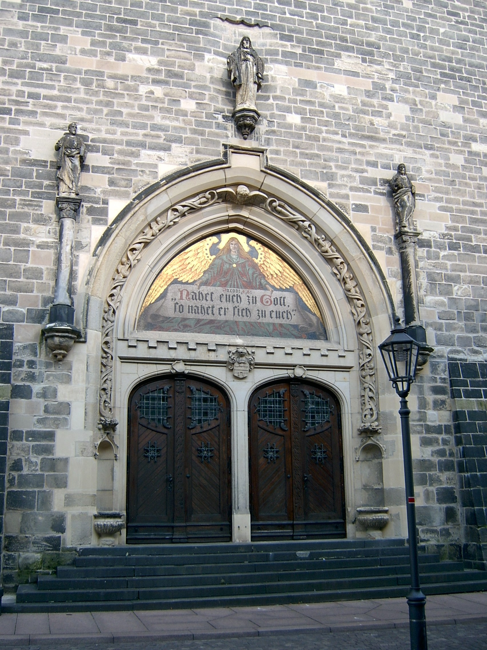 Das westlich Eingangsportal der St. Jakob in Köthen (Anhalt).